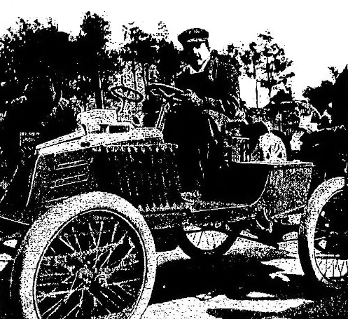 Louis Renault au Paris-Berlin 1901, Histoire de l'automobile, Pierre Souvestre, éd. H. Dunod et E. Pinat, 1907 (ASIN B001BPBE58) p.772